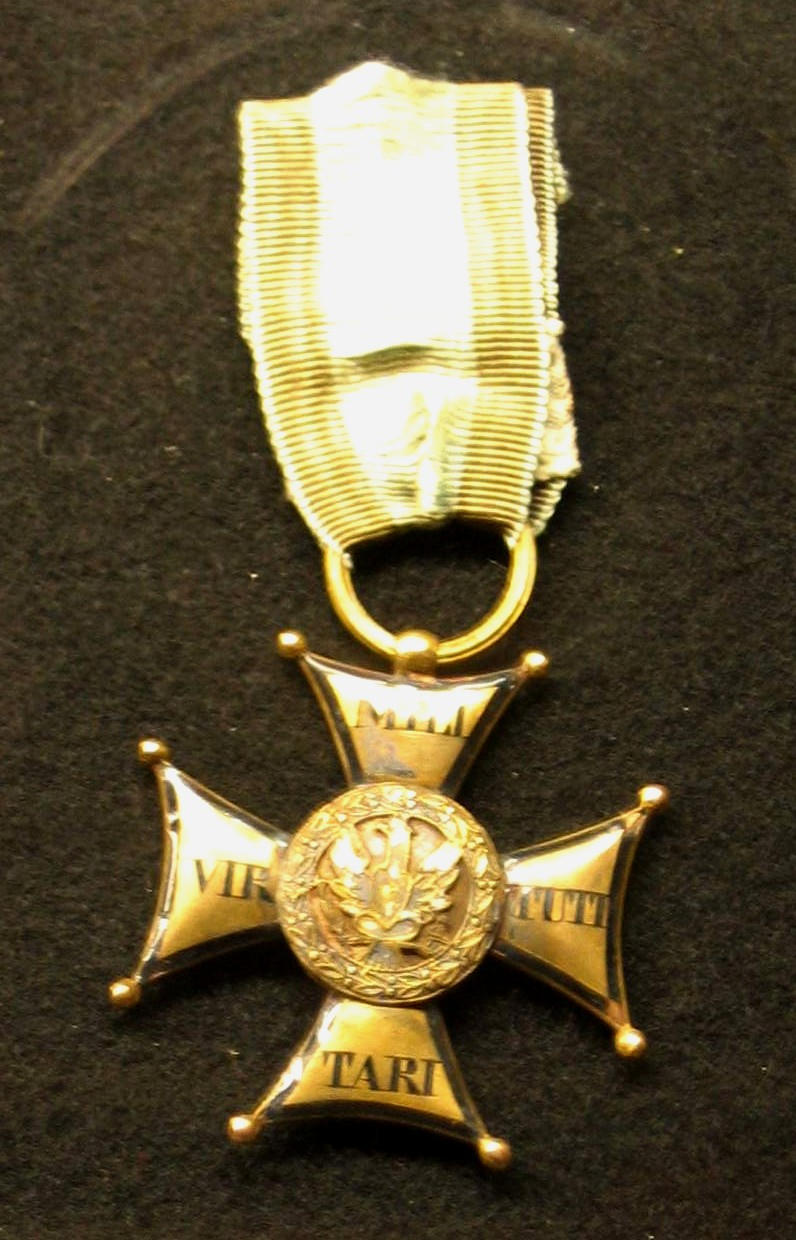 Virtuti Militari 1815 author User:Mathiasrex Maciej Szczepańczyk